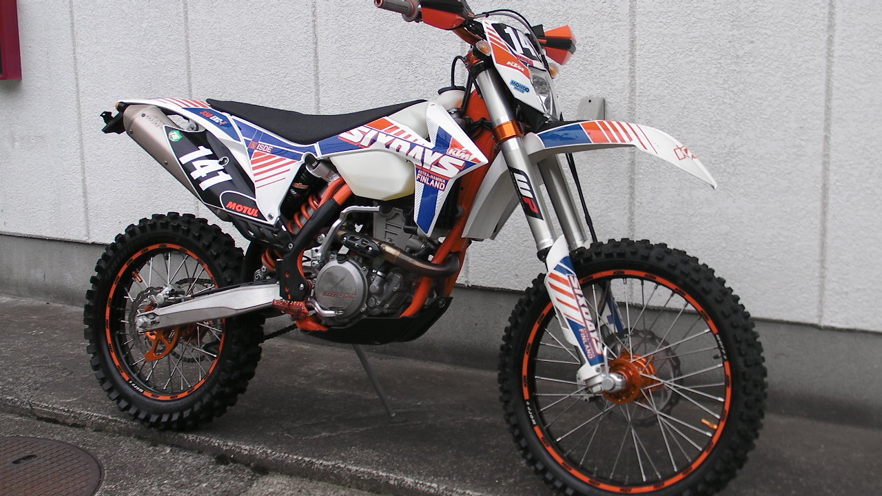 KTM 350 EXC-F